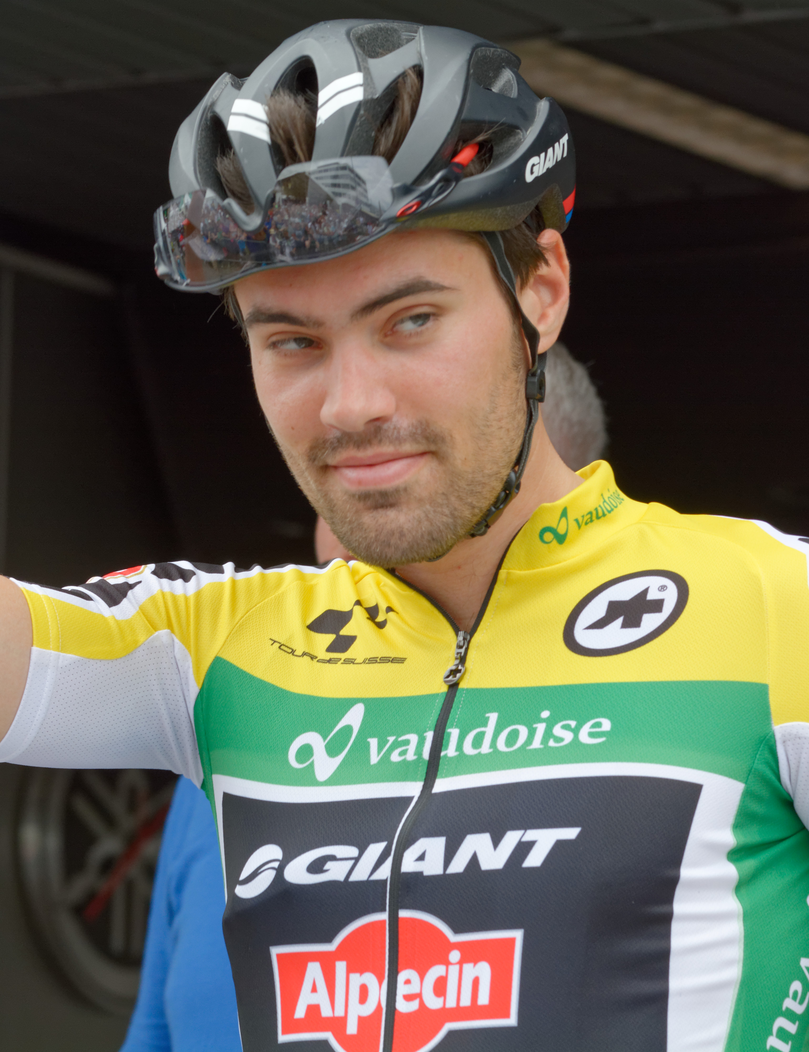 D71_0023_DxO